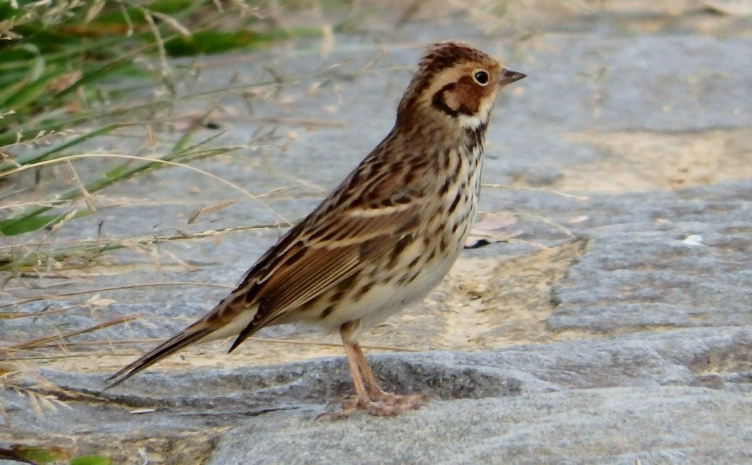 Emberiza pusilla